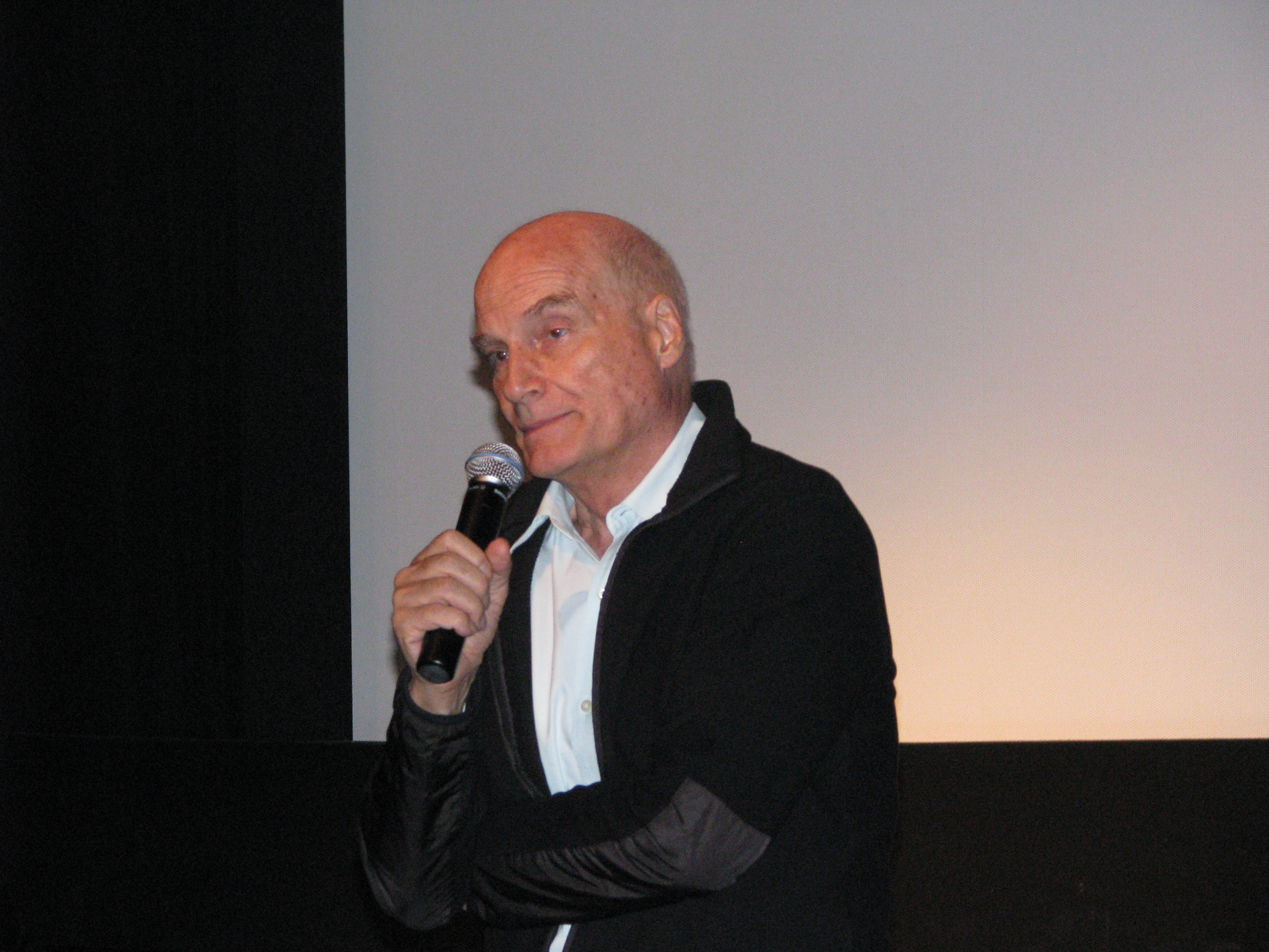 Director Barbet Schroeder, of "Inju, la bete dans l'ombre".